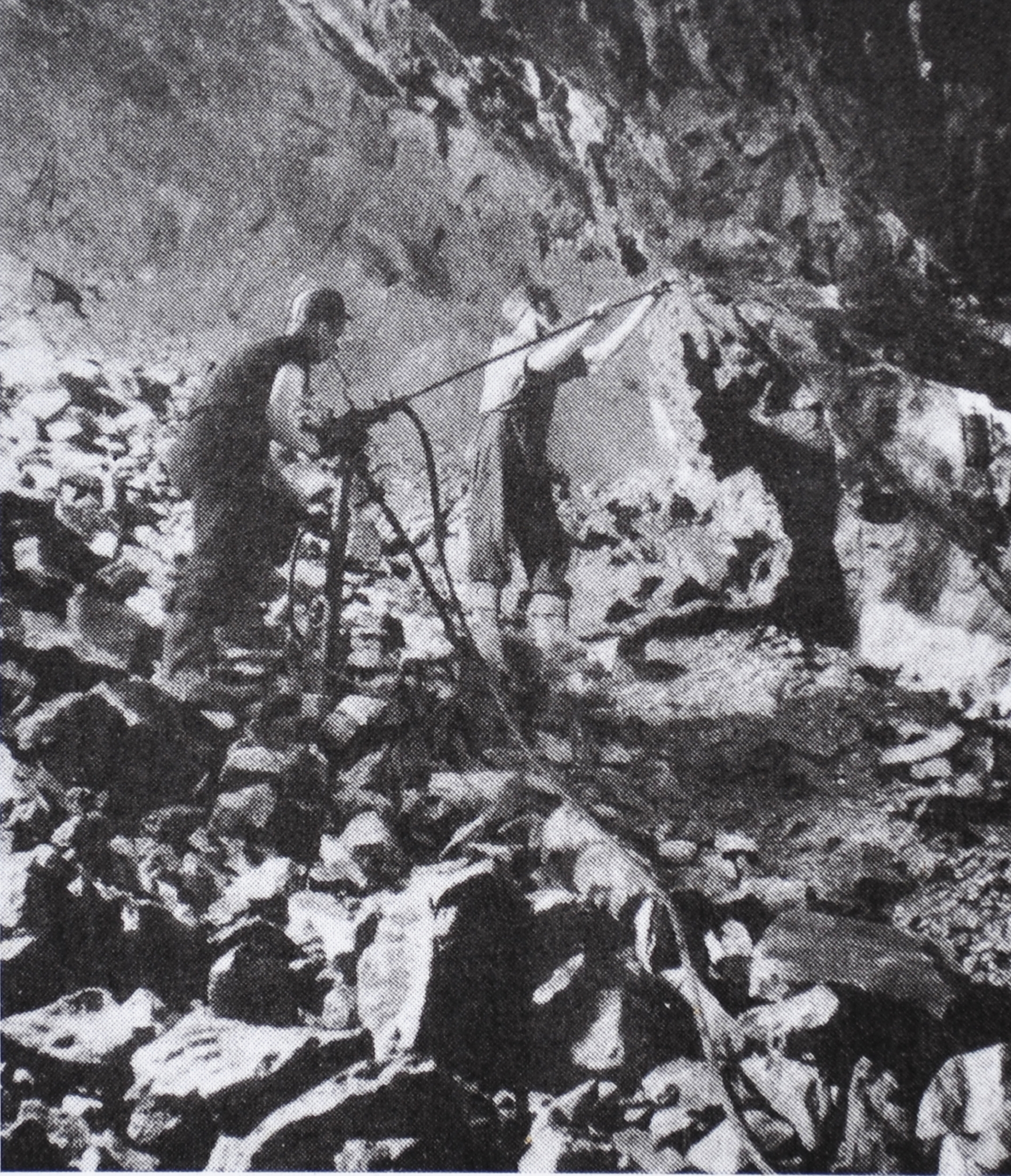 Grube Füsseberg - Friedrich Wilhelmː Firstenstoßbau - Bohren am schräggestelltem Stoß zur Vorbereitung der Sprengungen (Schießarbeit). Untenː bereits abgeschossenes Haufwerk. Bild aufgenommen in der Grube Füsseberg.